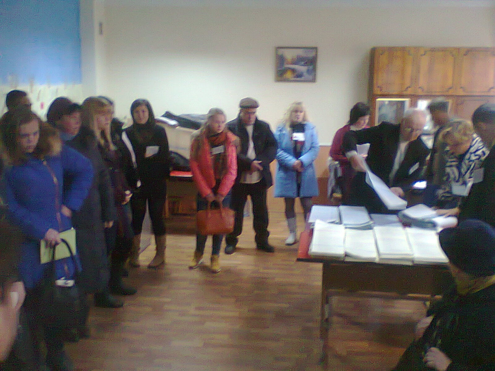 Ранкове засідання звичайної дільничної виборчої комісії у Білій Церкві на парламентських виборах 2014 року. До початку голосування члени комісії розподіляють між собою бюлетені між собою, згідно процедури, після того як дістали їх з запломбованого сейфу, на початку засідання. За процесом слідкують спостерігачі від партій, кандидатів, громадських організацій та преси